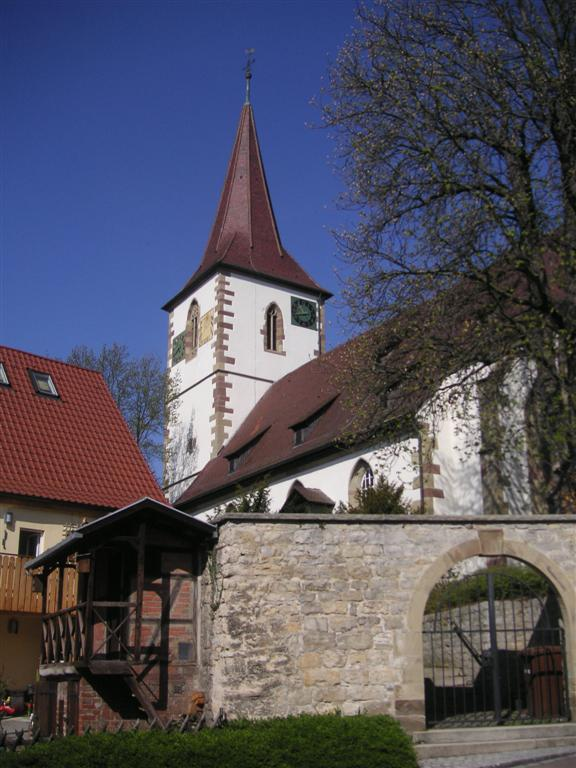 Margaretenkirche in Aldigen (Remseck am Neckar)